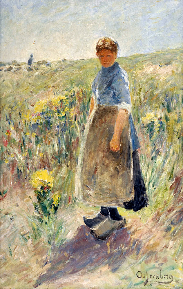 Mädchen in den Dünen. Signiert. Öl auf Leinwand, 48,5 x 32,5 cm